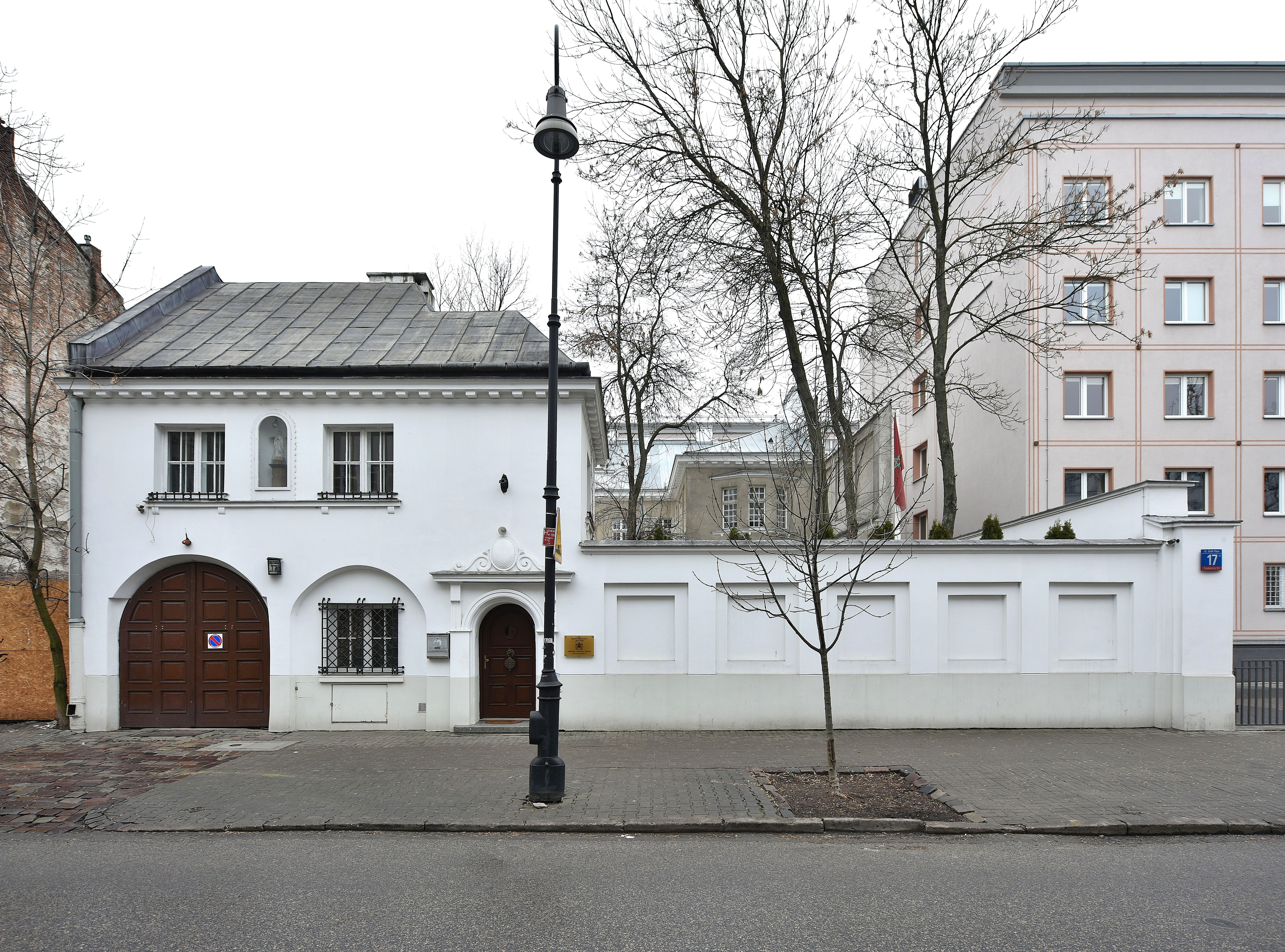 Pałacyk Z. Okoniewskiego przy ul. Emilii Plater 17 w Warszawie